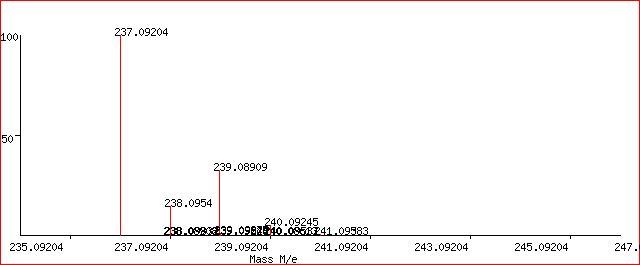 espectro de masas de la ketamina